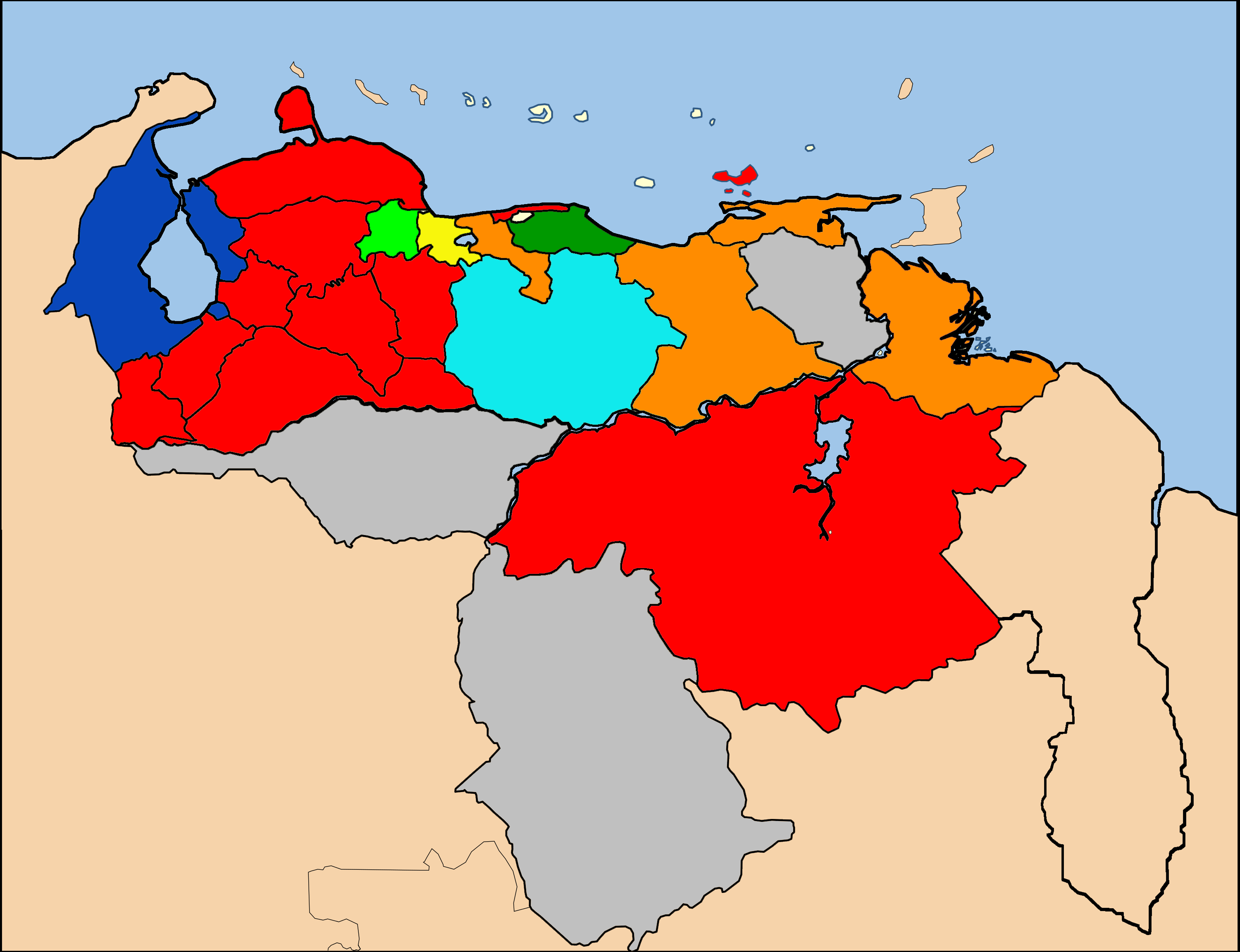 MIlitancia política del candidato vencedor por estado en las elecciones regionales de Venezuela